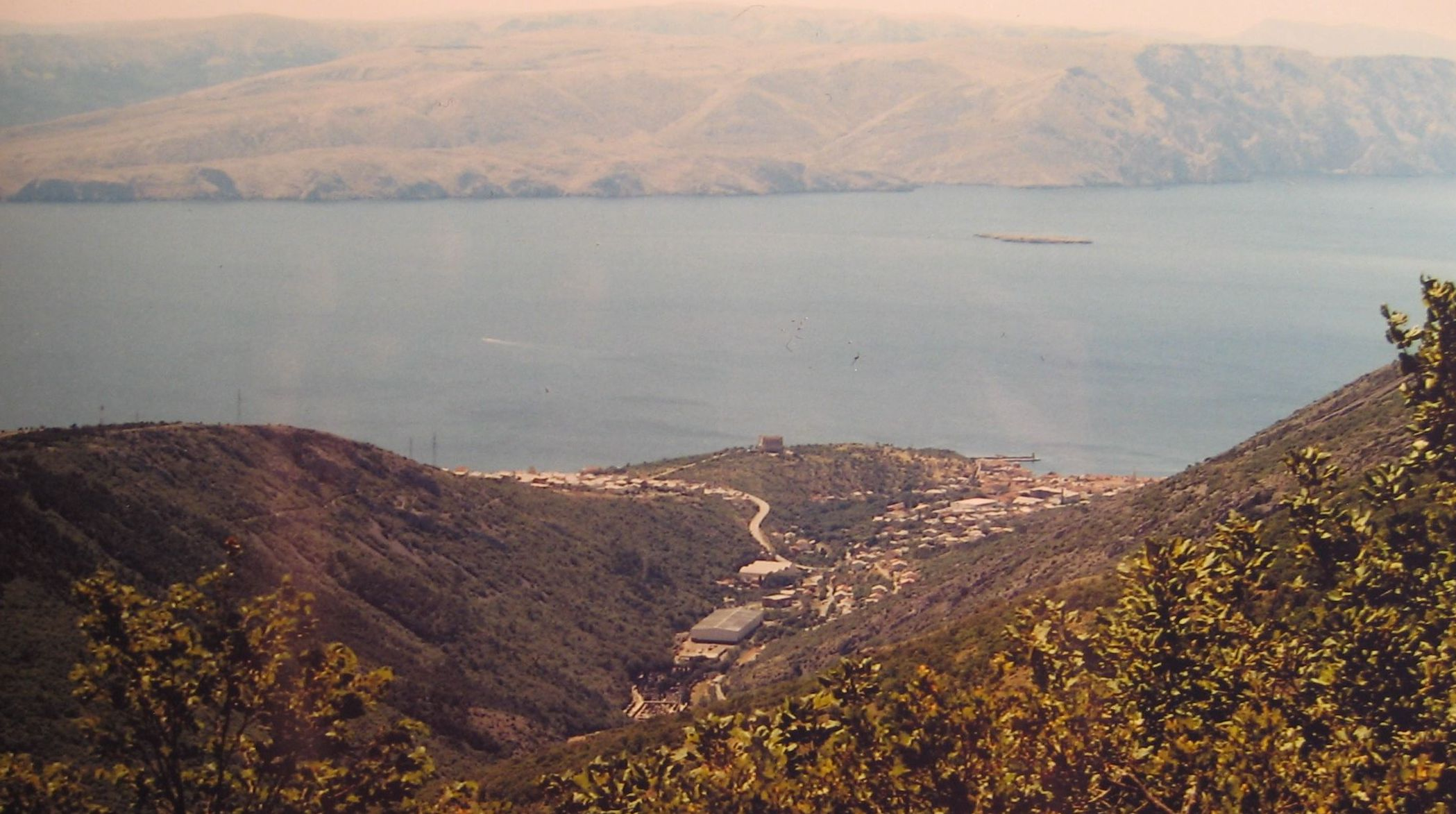 Senj, Hrvatska - Vlasništvo Zeljko